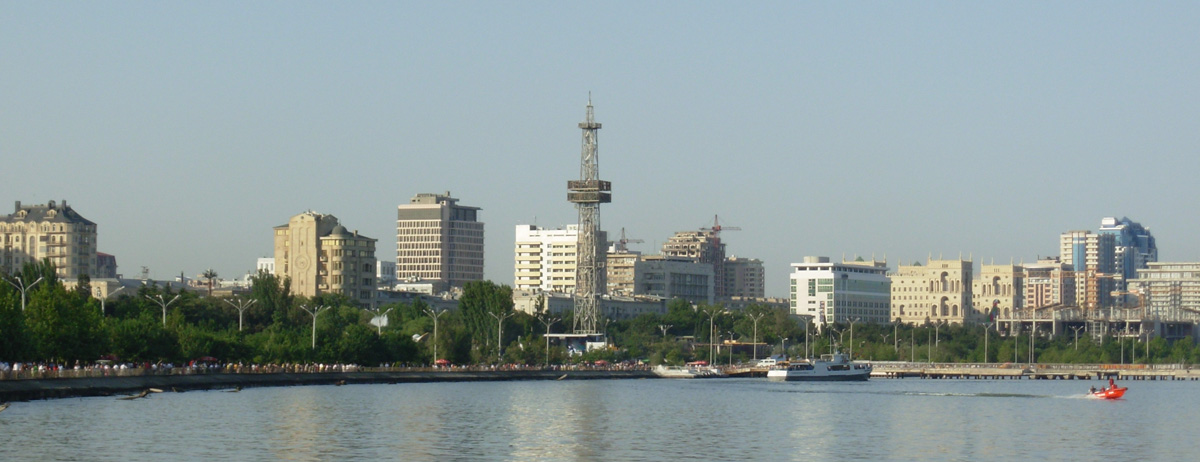 Бакинский бульвар, вид с моря